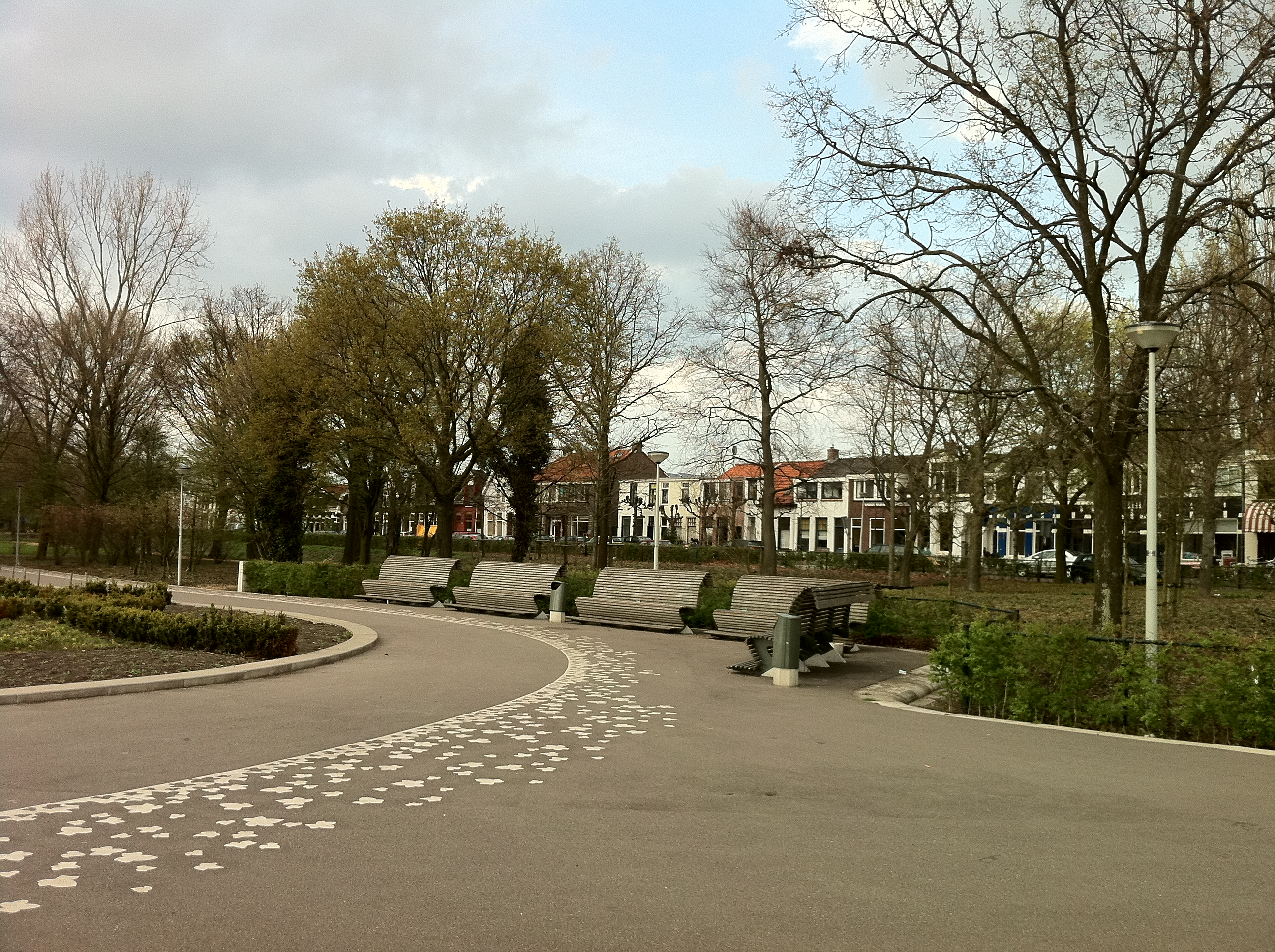 Amsterdam - Volewijckspark